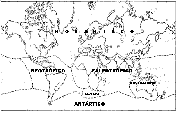 Mapa en el que se muestran los territorios abarcados por los seis reinos florales